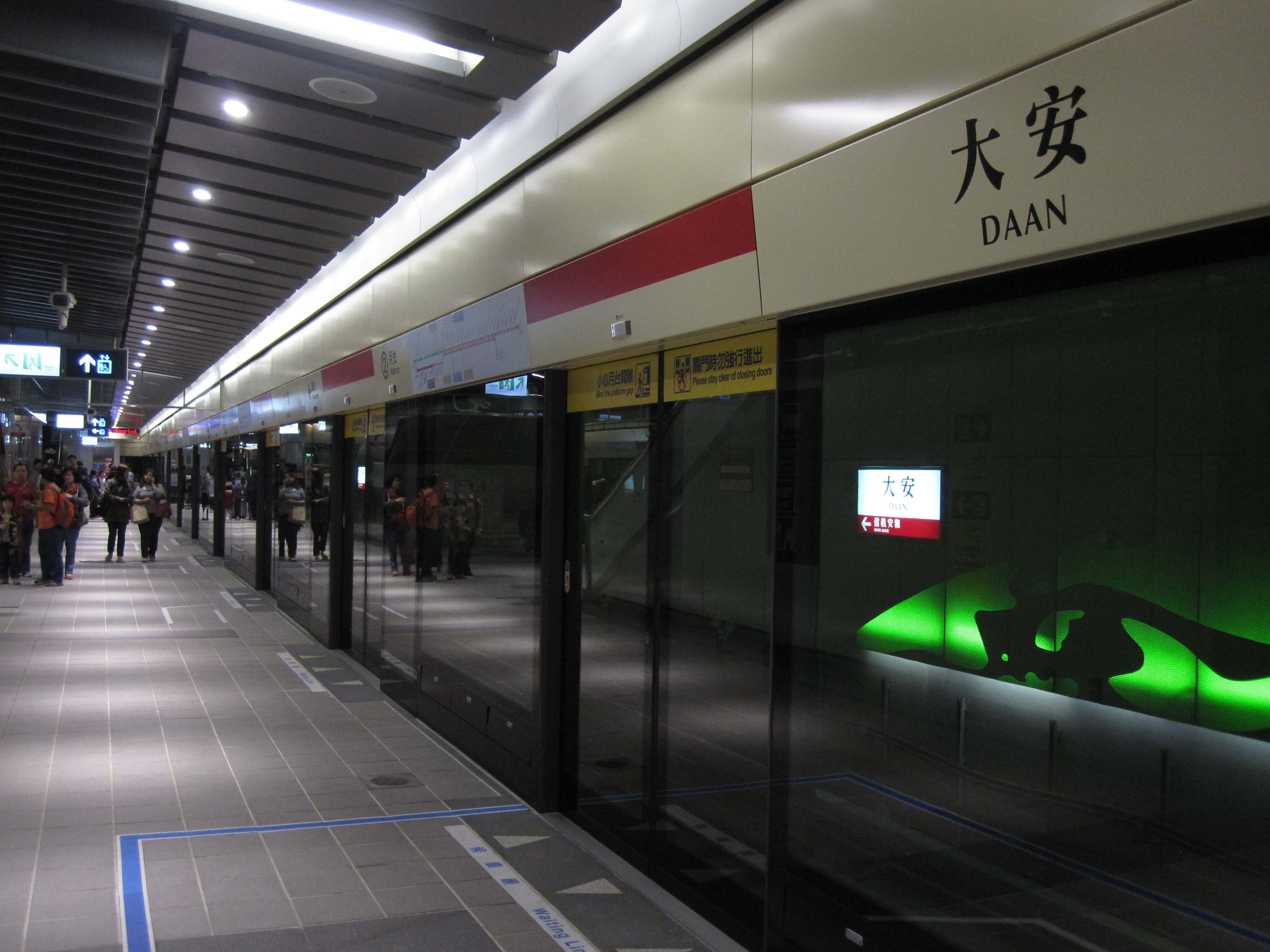 中文（台灣）: 台北捷運大安站信義線2月台。